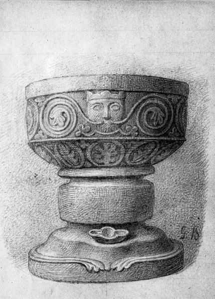 Dopfunt av täljsten. Omkring 1250, av Torbillus. Teckning i Göteborgs Universitetsbibliotek, nr. 57 (58). Teckningen signerad G. B., Gustaf Brusewitz. Kategori: (04) Dopfuntar Dopfunt av täljsten. Omkring 1250, av Torbillus. Teckning i Göteborgs Universitetsbibliotek, nr. 57 (58). Teckningen signerad G. B., Gustaf Brusewitz.